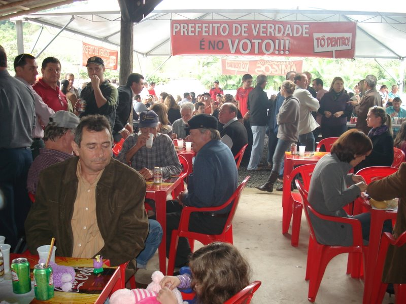 Churrasco dos Amigos do sempre prefeito Nilson Bylaardt